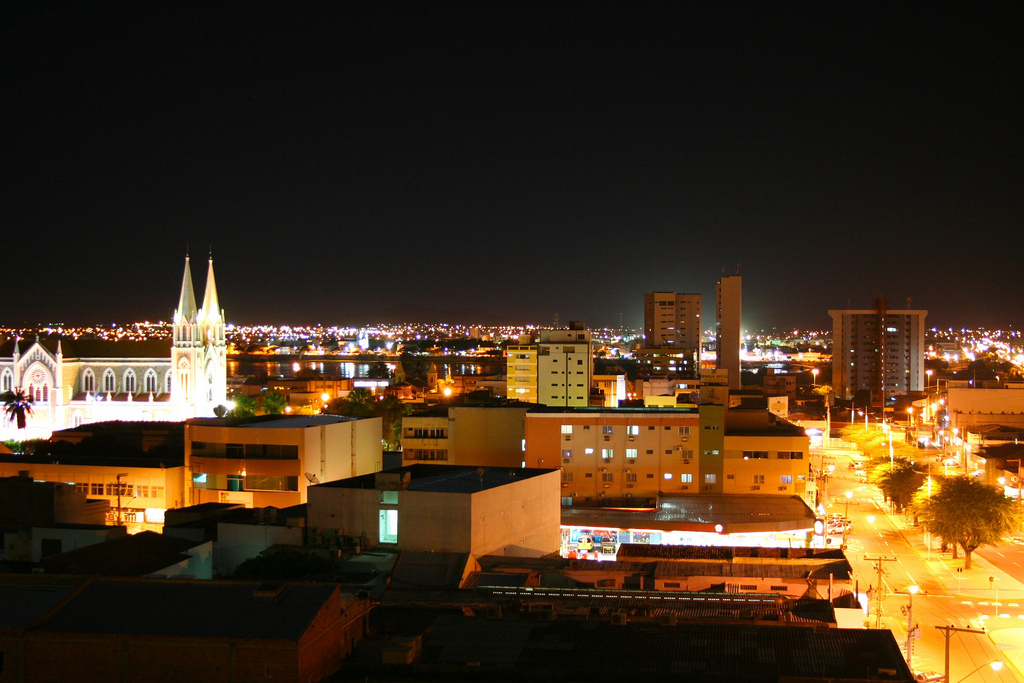 Petrolina-PE e Juazeiro-BA ao fundo